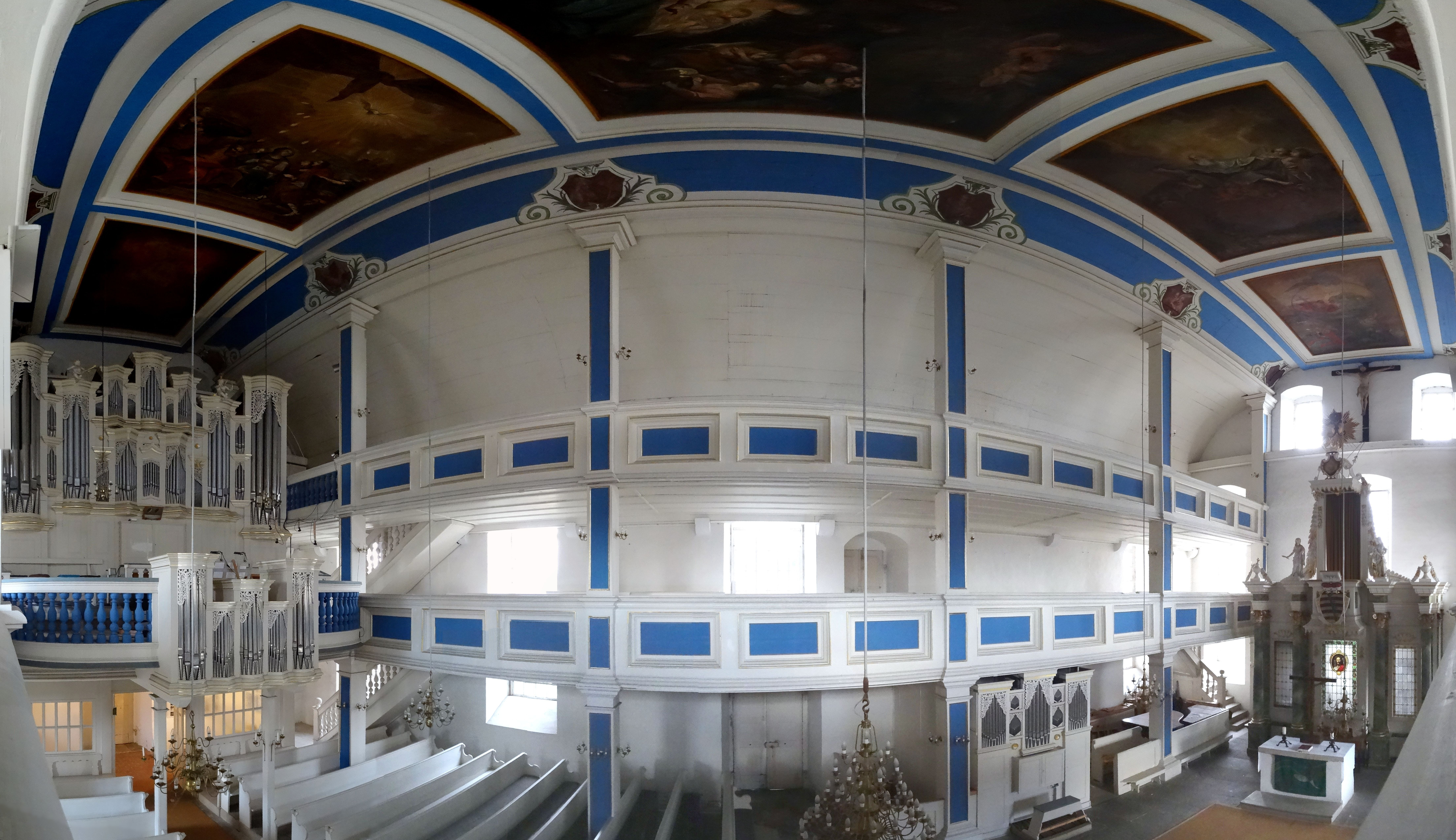 St. Nicolai Sundhausen Innenraumpanorama. Die Dorfkirche St. Nikolai wurde 1729 bis 1730 durch den Barockbaumeister Johann Erhard Straßburger errichtet und durch Initiative der Gebrüder Manfred & Siegfried Sperlich in den 1980er Jahren mühe- und liebevoll restauriert.